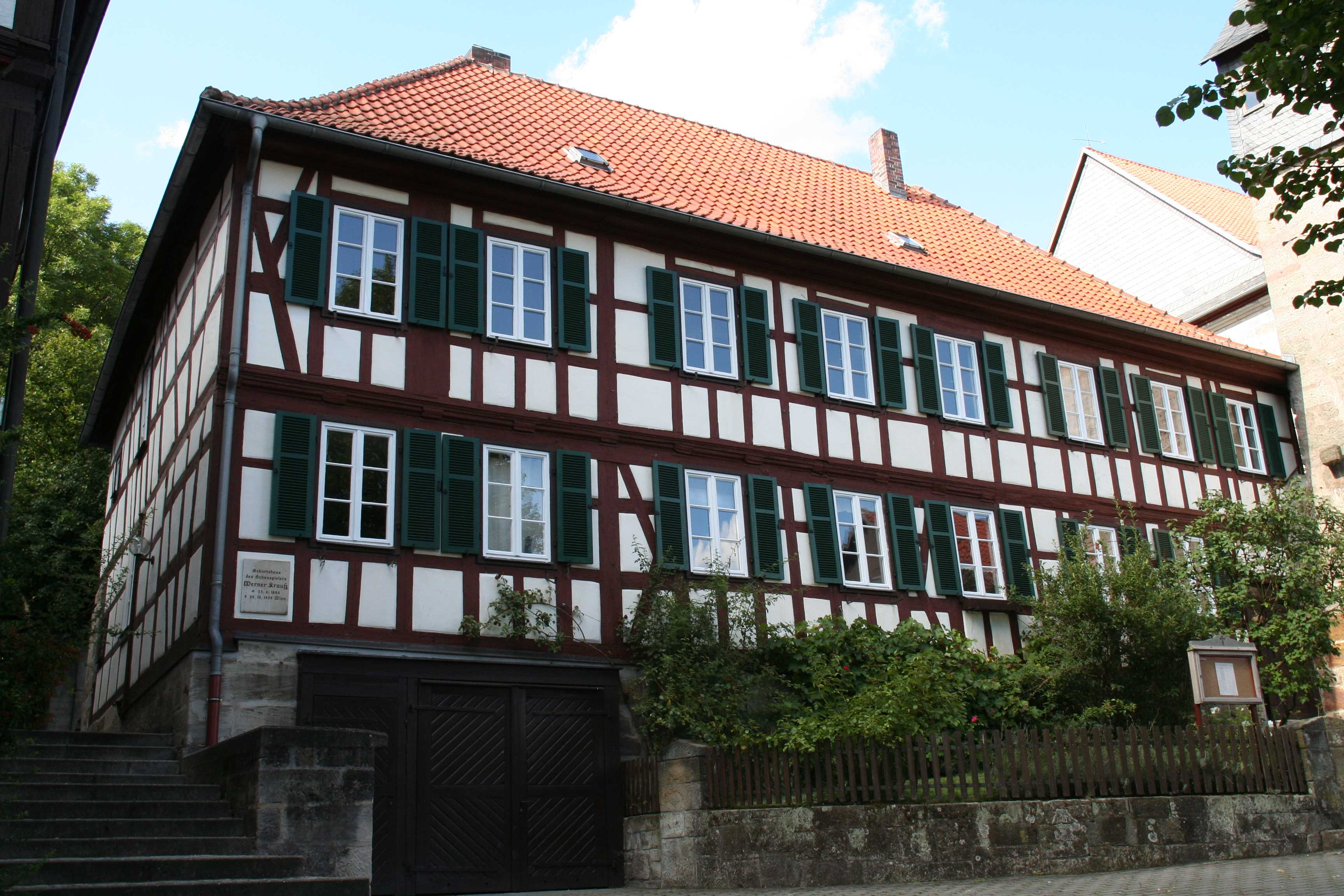 Pfarrhaus Gestungshausen, Ortsteil von Sonnefeld im Landkreis Coburg in Bayern Geburtshaus von Werner Krauß